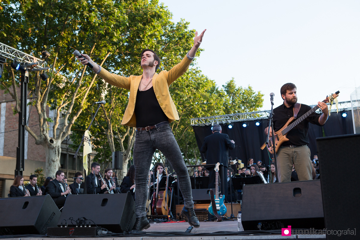 Concert d'Obeses a les Festes de Maig 2016 de Badalona Plaça de la Plana Fotografía: Cristina Ruiz Twitter: @unnika